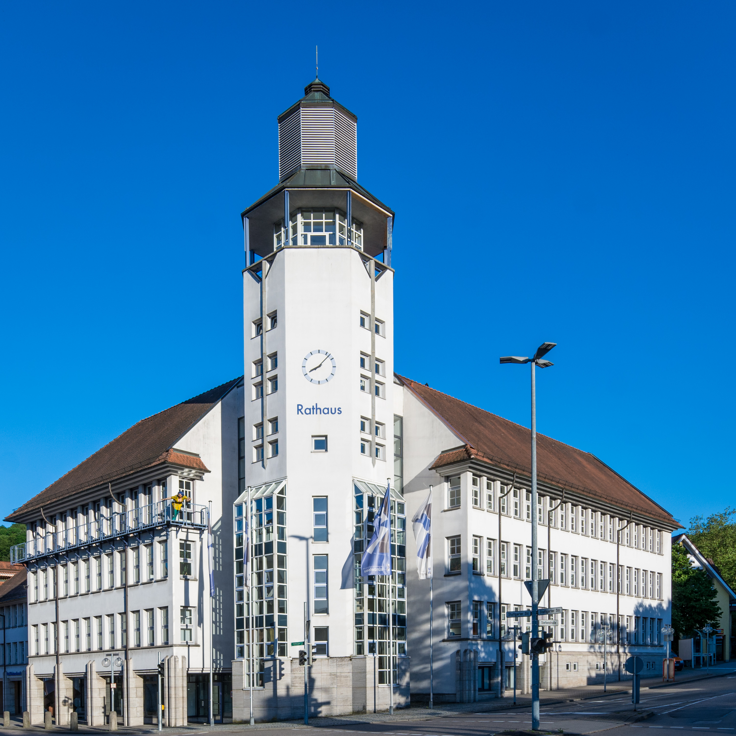 Das 1989 fertig gestellte Neue Rathaus in der Hohenloher Kreisstadt Künzelsau.